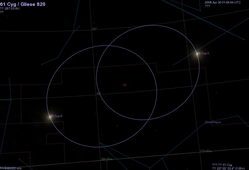 고니자리 61 항성계. 고니자리 61은 이중성계로 오렌지색 왜성 두 개로 이루어져 있다.